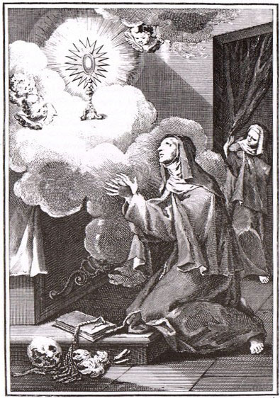 Grabado de la Beata María Ángela Astorch, Fundadora del Monasterio de la Exaltación del Santísimo Sacramento de Murcia (España).